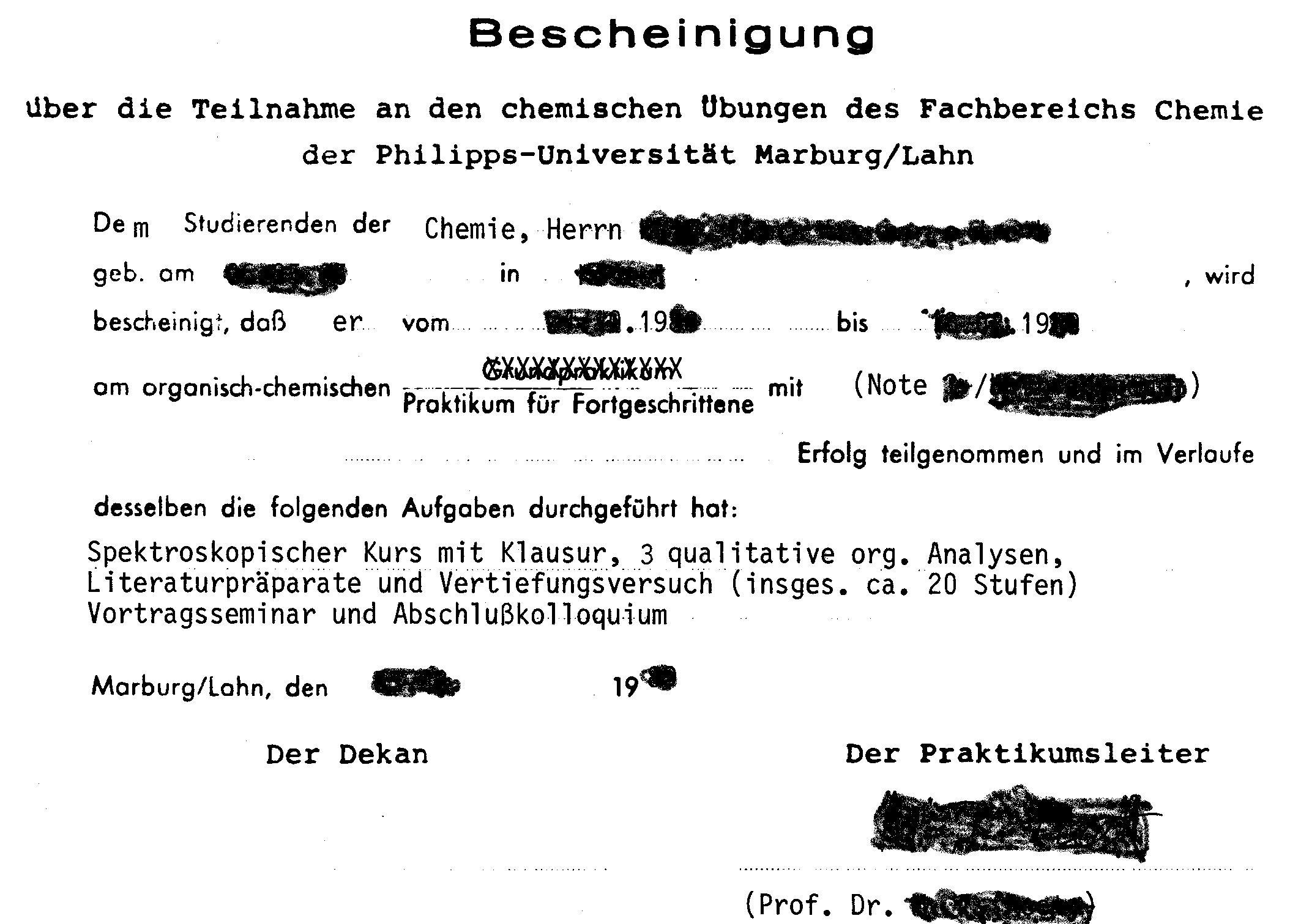 Praktikumsschein